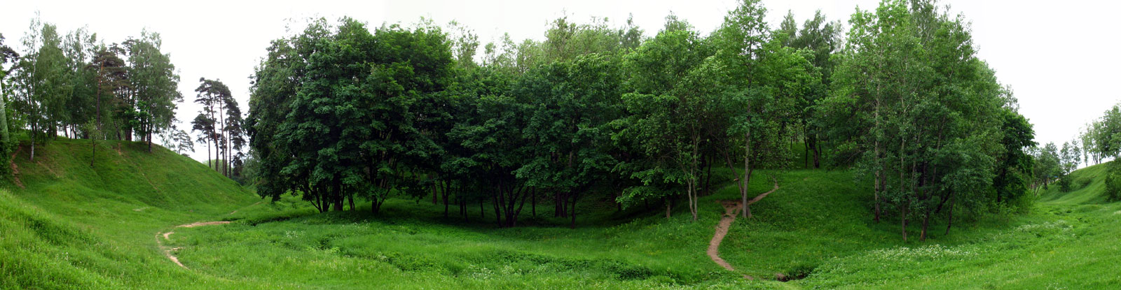 Jurjeva Hill in Viciebsk